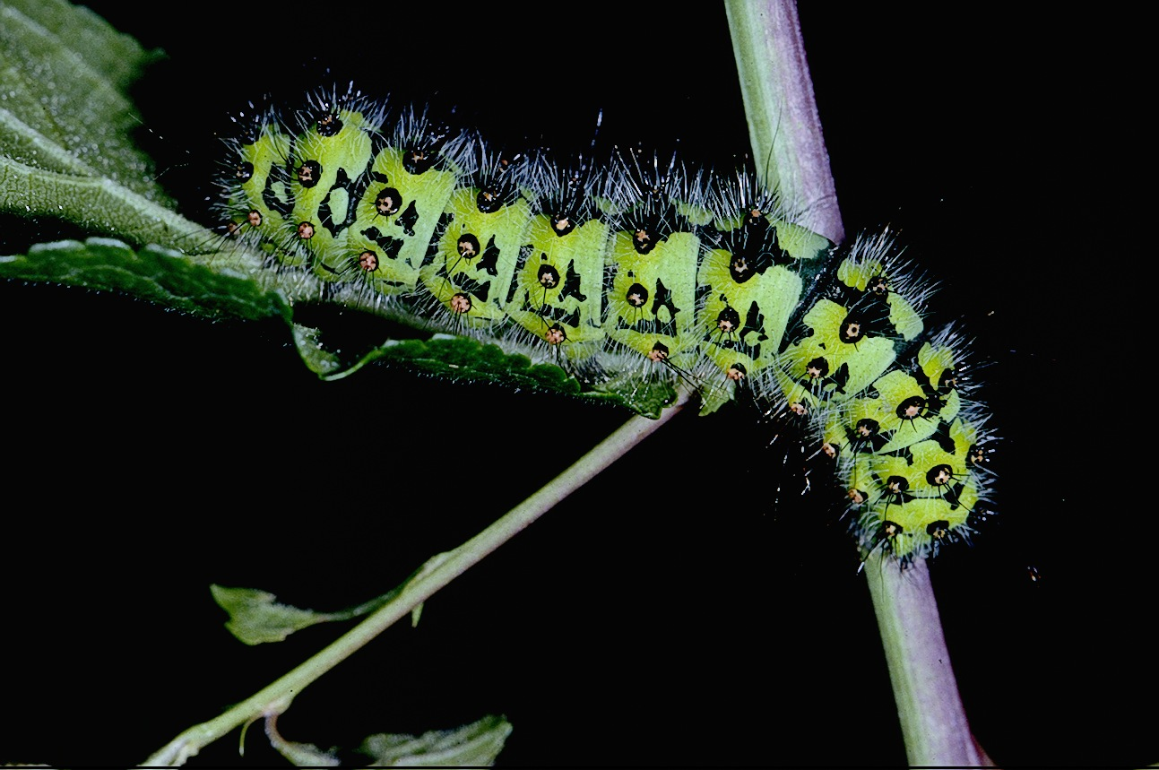 Je suis l'auteur de ce cliché (phototèque personnelle) réalisé en Basse-Normandie France, en 1990 en cage d'élevage permettant le suivi du cycle biologique sur plusieurs années. Cliché N°4 / 11. Nous y voyons la chenille de Saturnia Pavonia prête pour la métamorphose. (Petit Paon de nuit) Lépidoptère Hétérocère famille des saturniidae. Cliché origine diapositive numérisée.